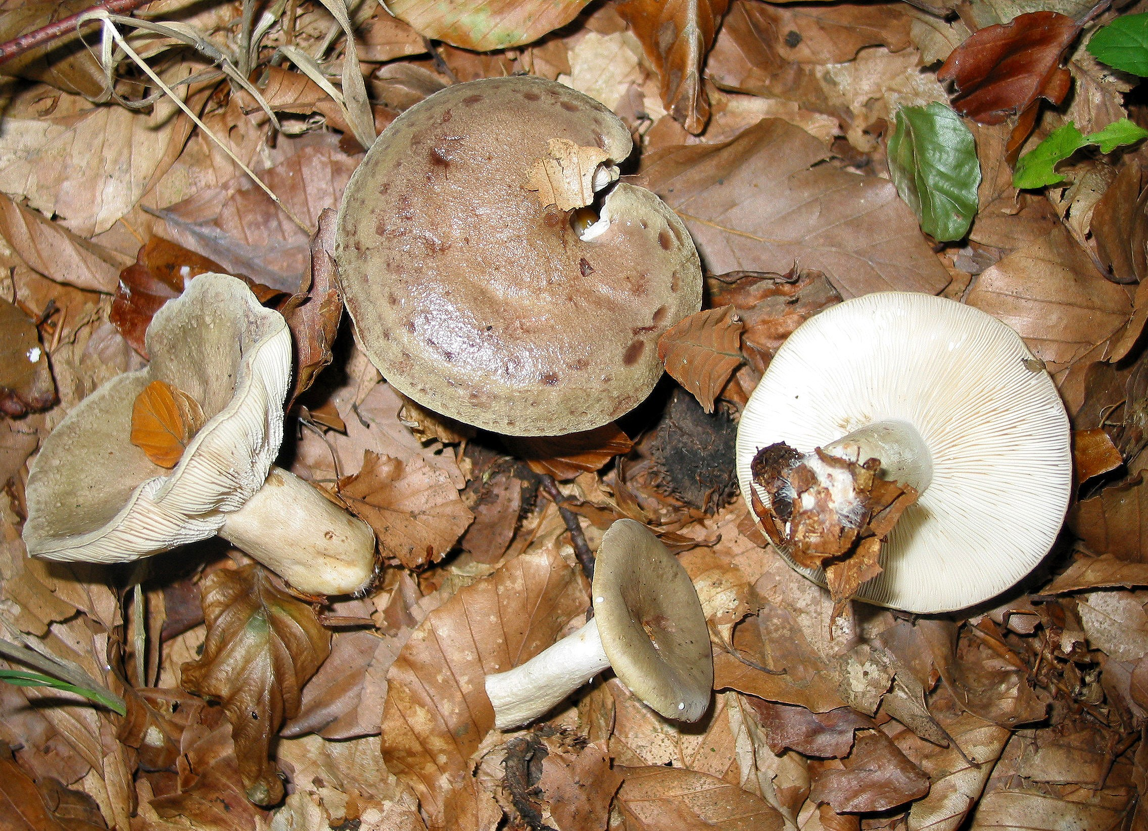 Lactarius blennius (la), Grüne Milchlinge (de), Slimy milk-cap (en), Lactaire muqueux (fr), Grijsgroene melkzwam (nl), Boleû a mokions (wa)